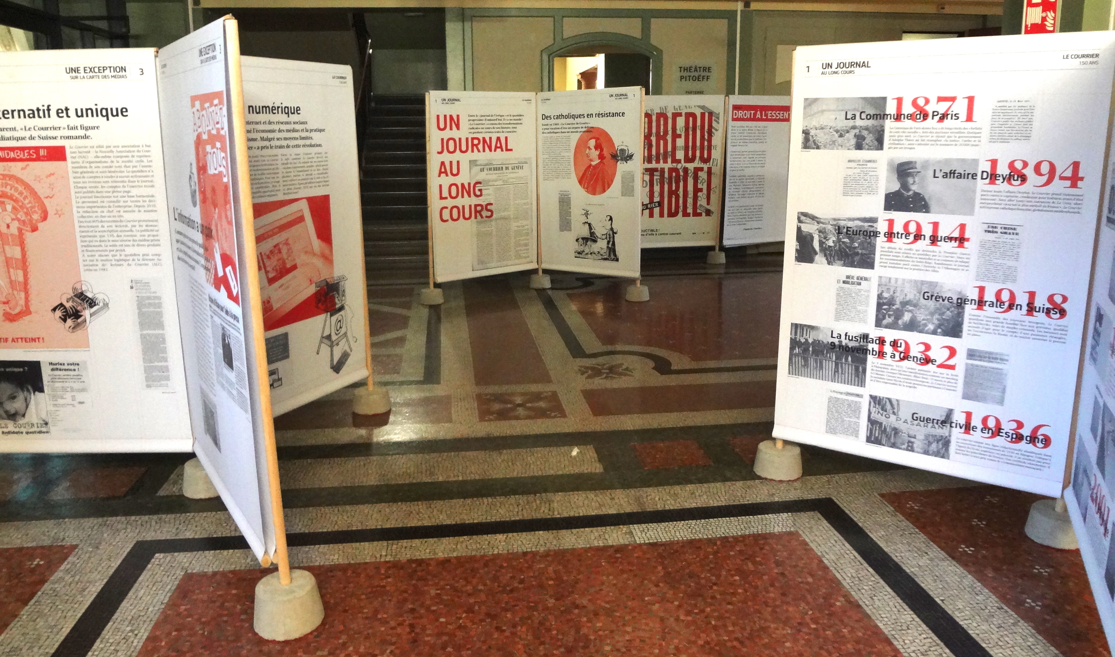 « La Grande Soirée : Samedi 17 novembre 2018 : Le Courrier fête ses 150 ans ! ». Salle communale de Plainpalais, rue de Carouge, Genève. L'exposition du 150ème.